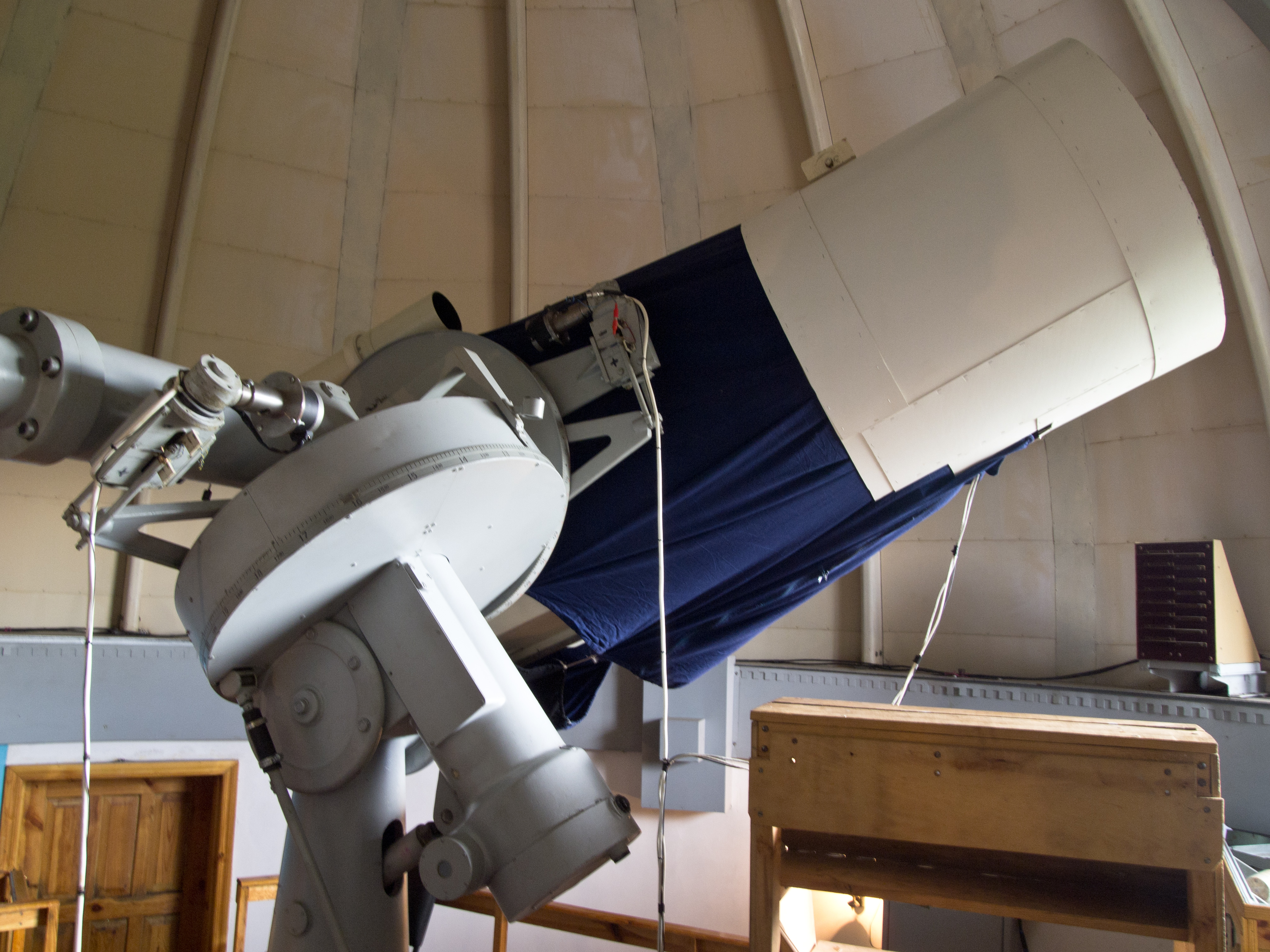 Андрушівська астрономічна обсерваторія, телескоп Zeiss-600.